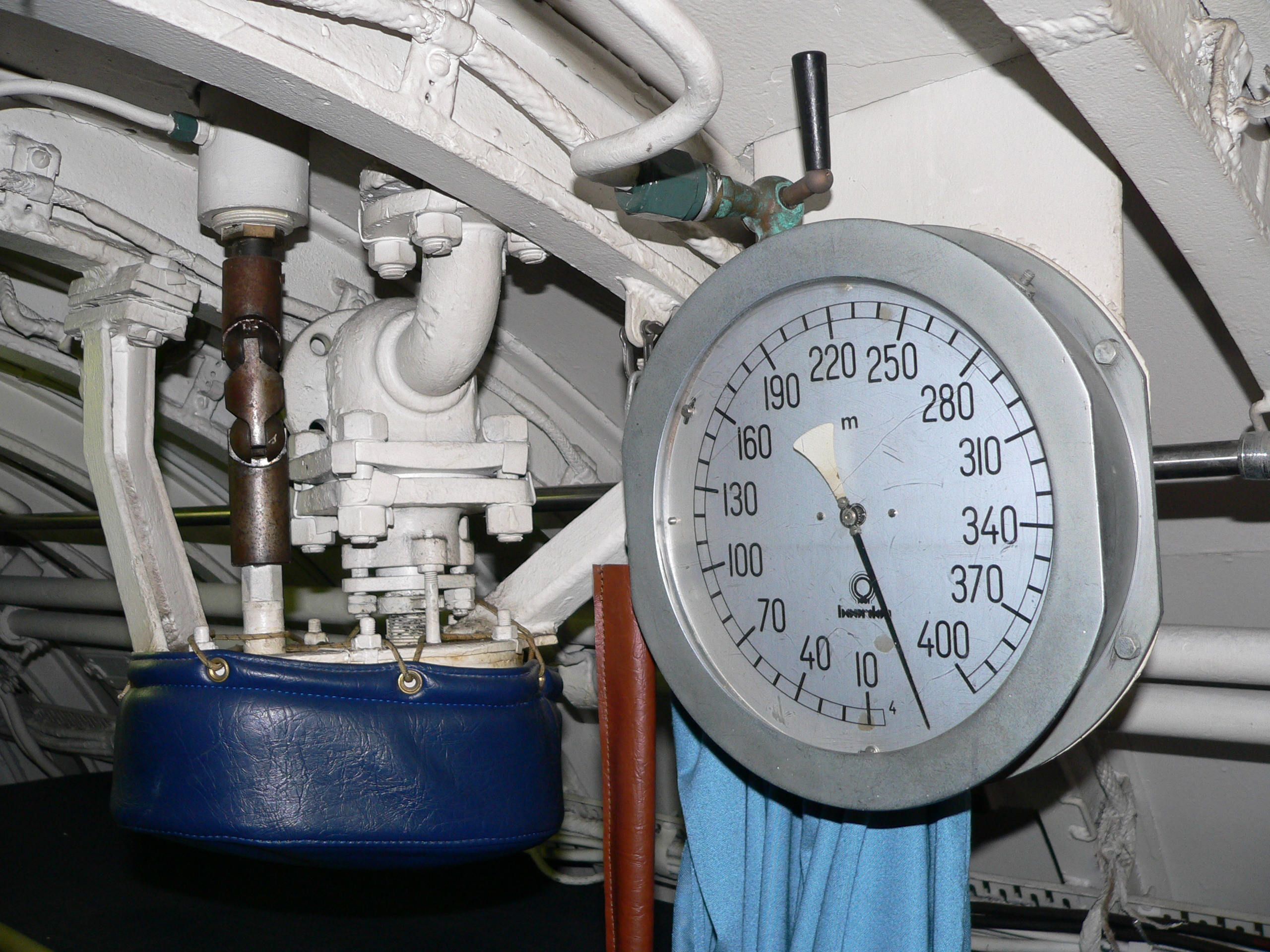 Argonaute